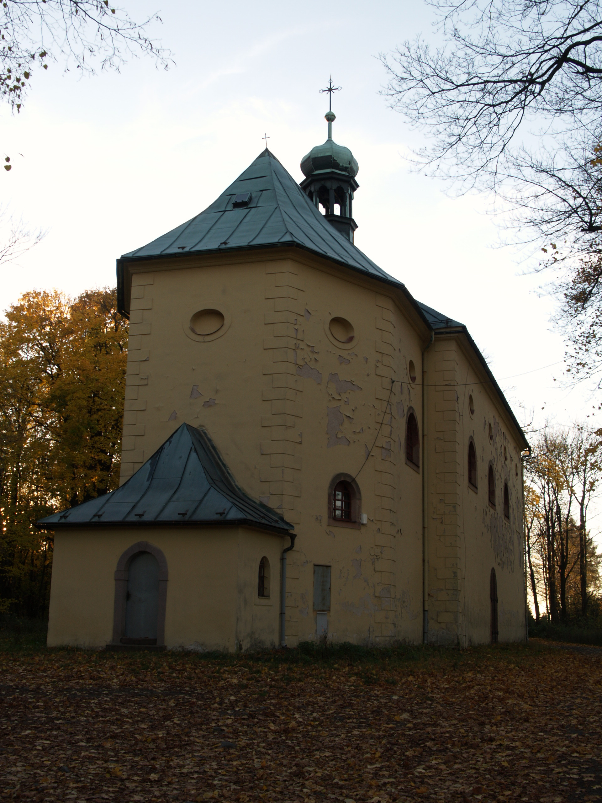 Česky: Kostelík u rozhledny na Táboře, Lomnice nad Popelkou, kat. území Chlum pod Táborem